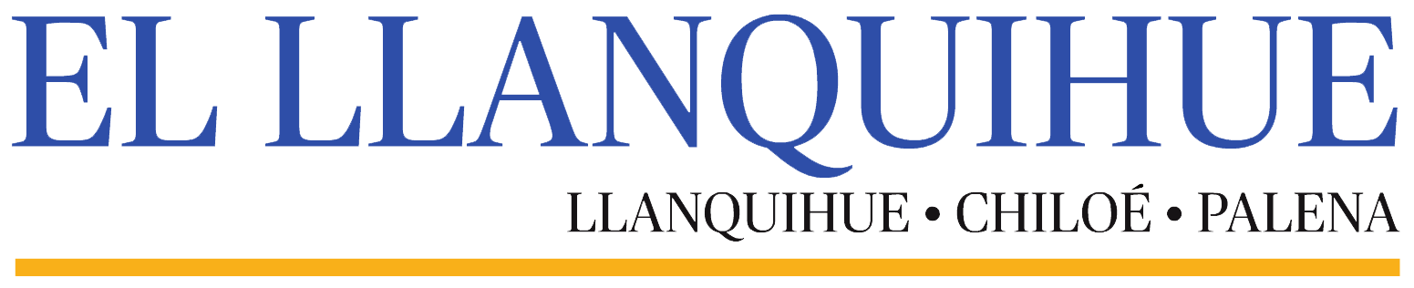 Logotipo del diario chileno El Llanquihue.